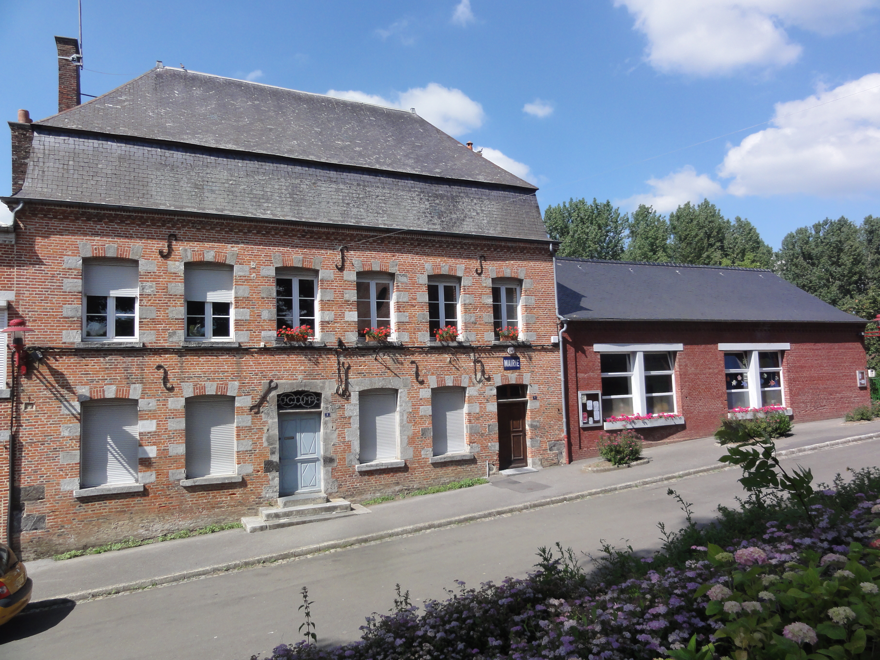 Ohis (Aisne) mairie